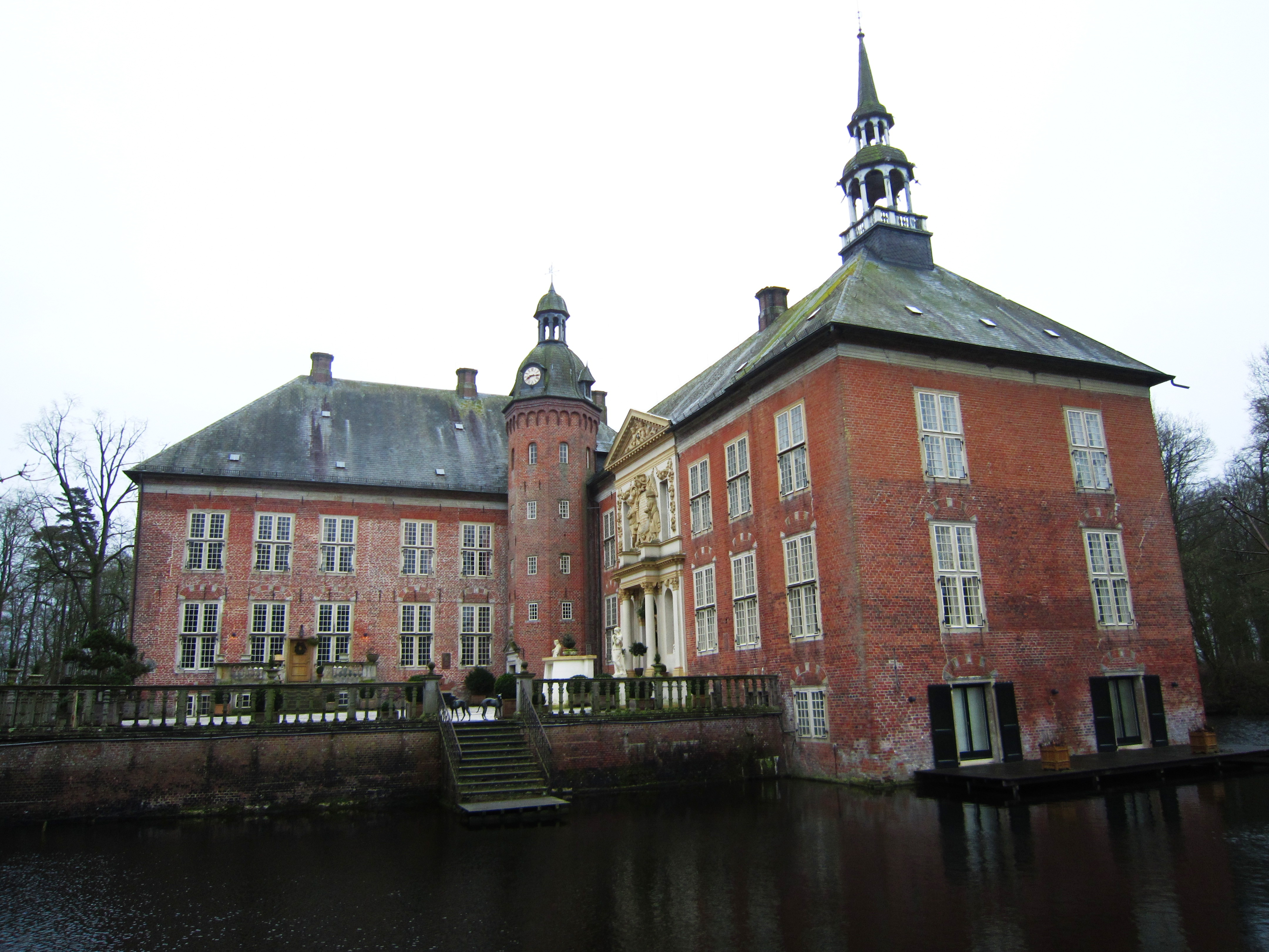 Schloss Gödens - Neustadtgödens - Sande